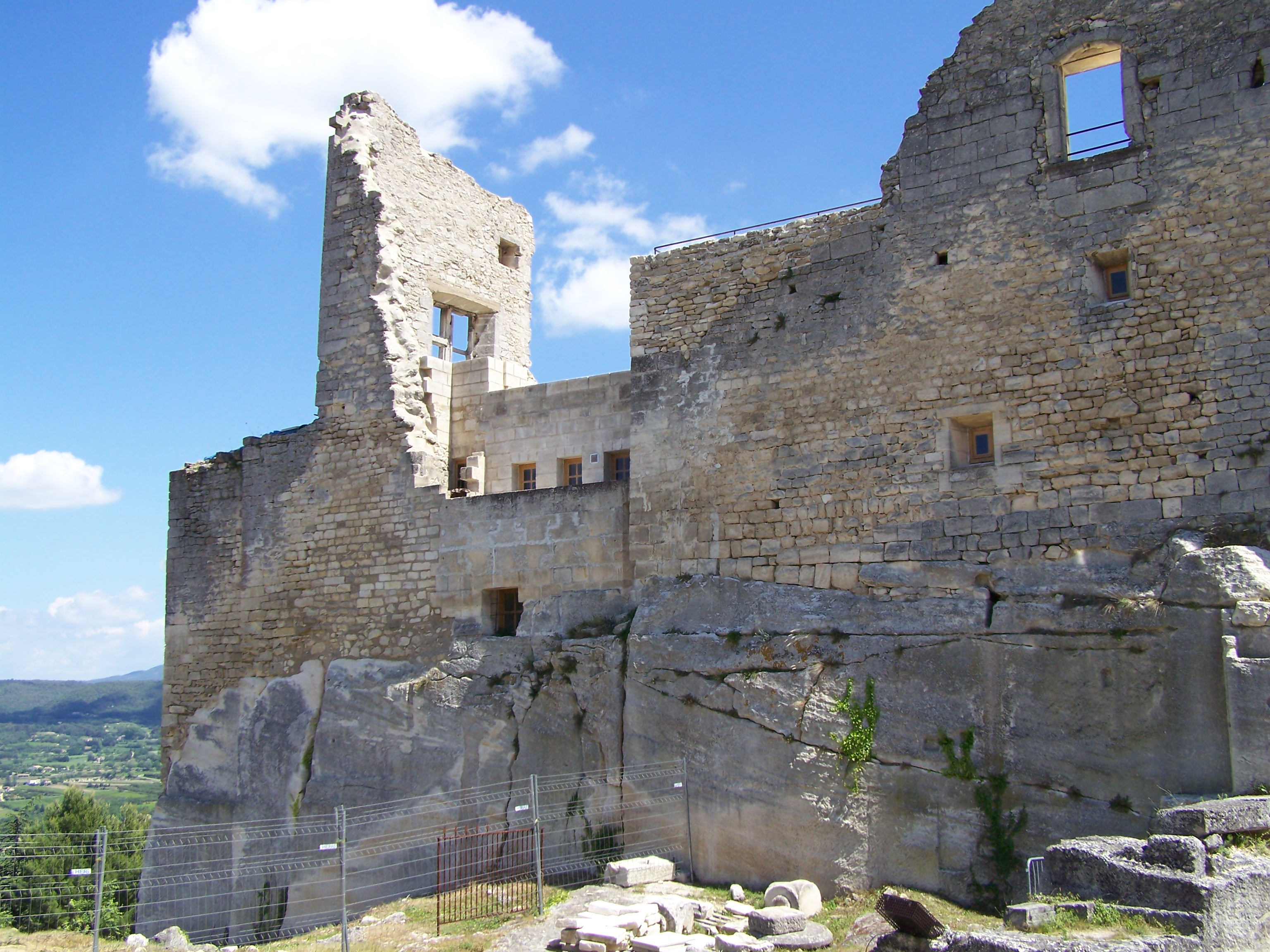 Burguine in Lacoste, im 18. Jahrhundert der Wohnsitz des Marquis de Sade